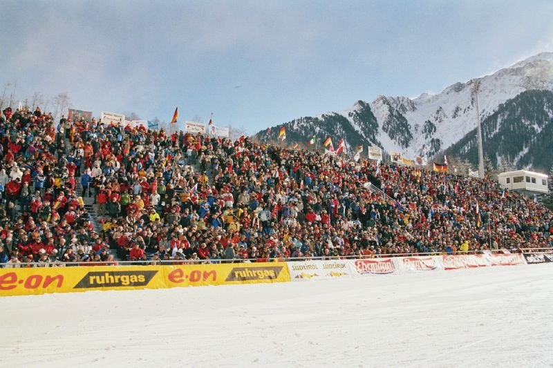 Biathlon_WC_Antholz_2006_01_Film3_MassenDamen_01